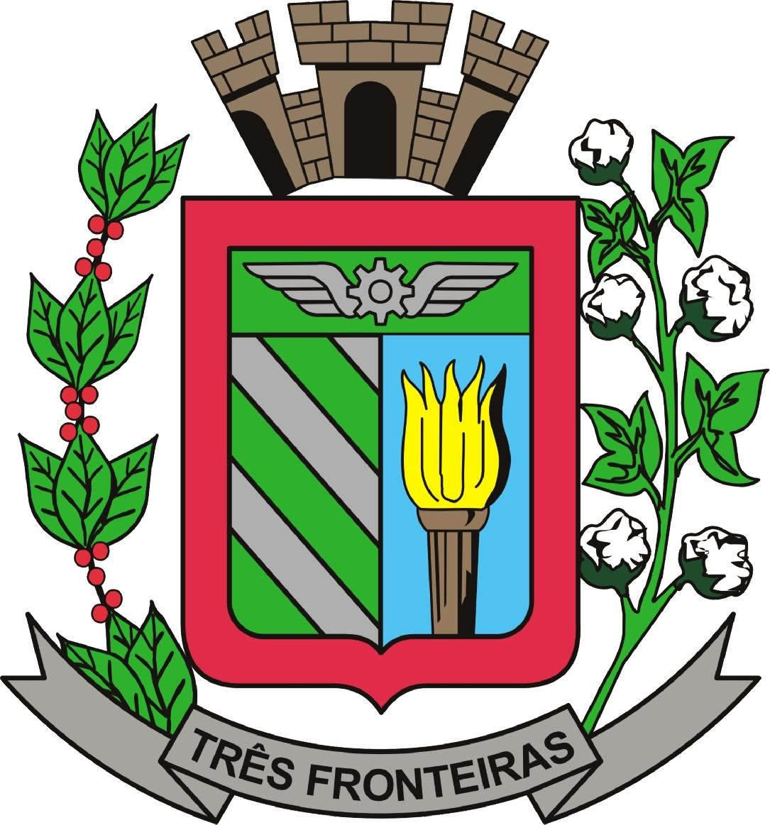 Brasão de Três Fronteiras